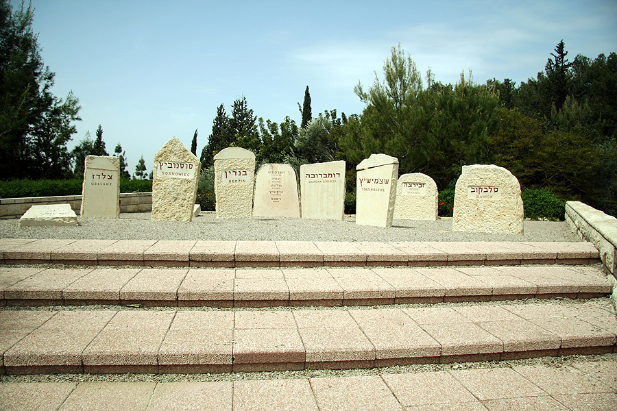 חלק מהאנדרטה ביער קדושי זגלמביה